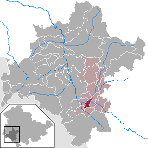 Einhausen in Thuringia - District Schmalkalden-Meiningen